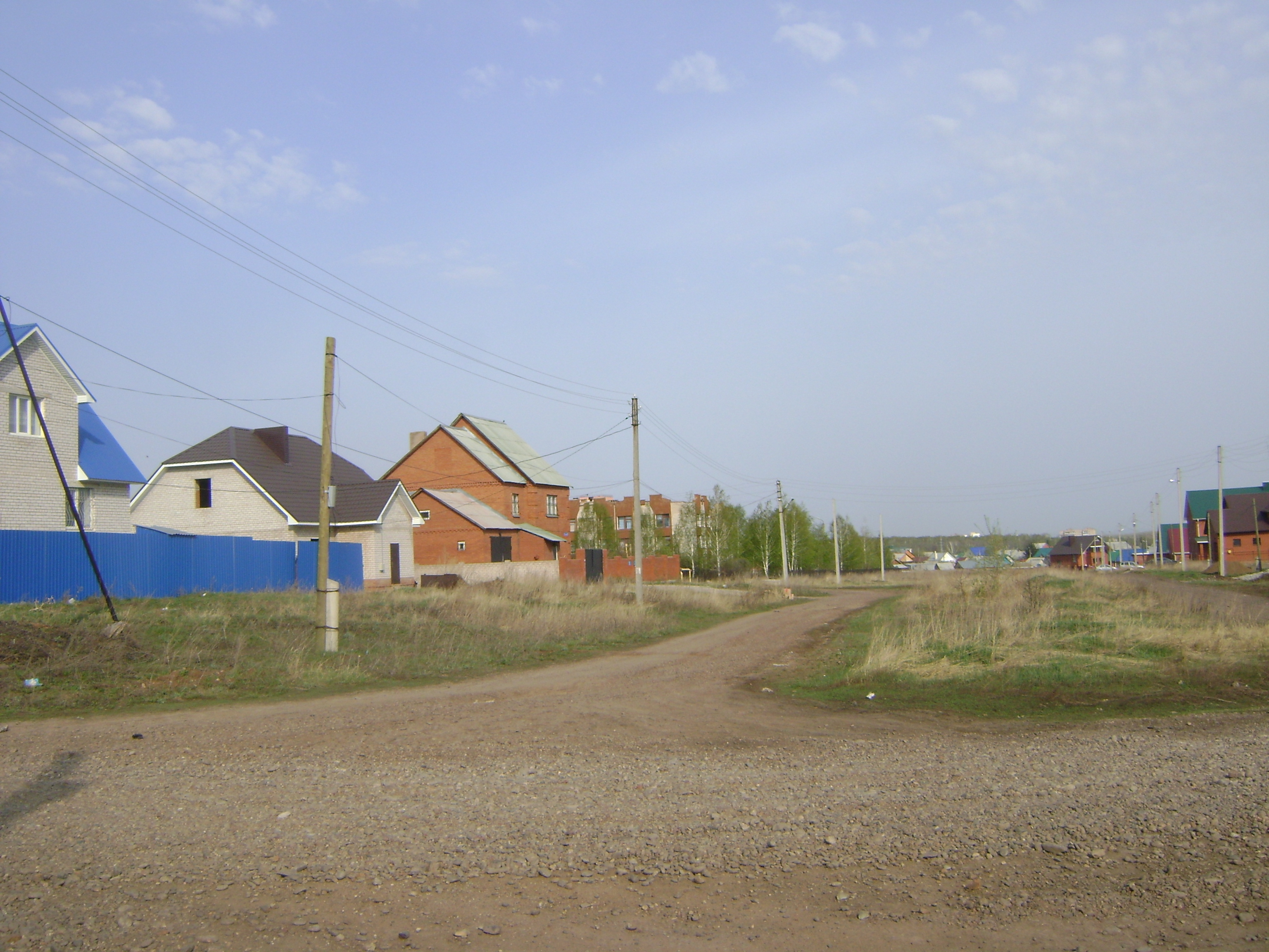 коробки домов в микрорайоне Юрматы-1 (Ишимбай)